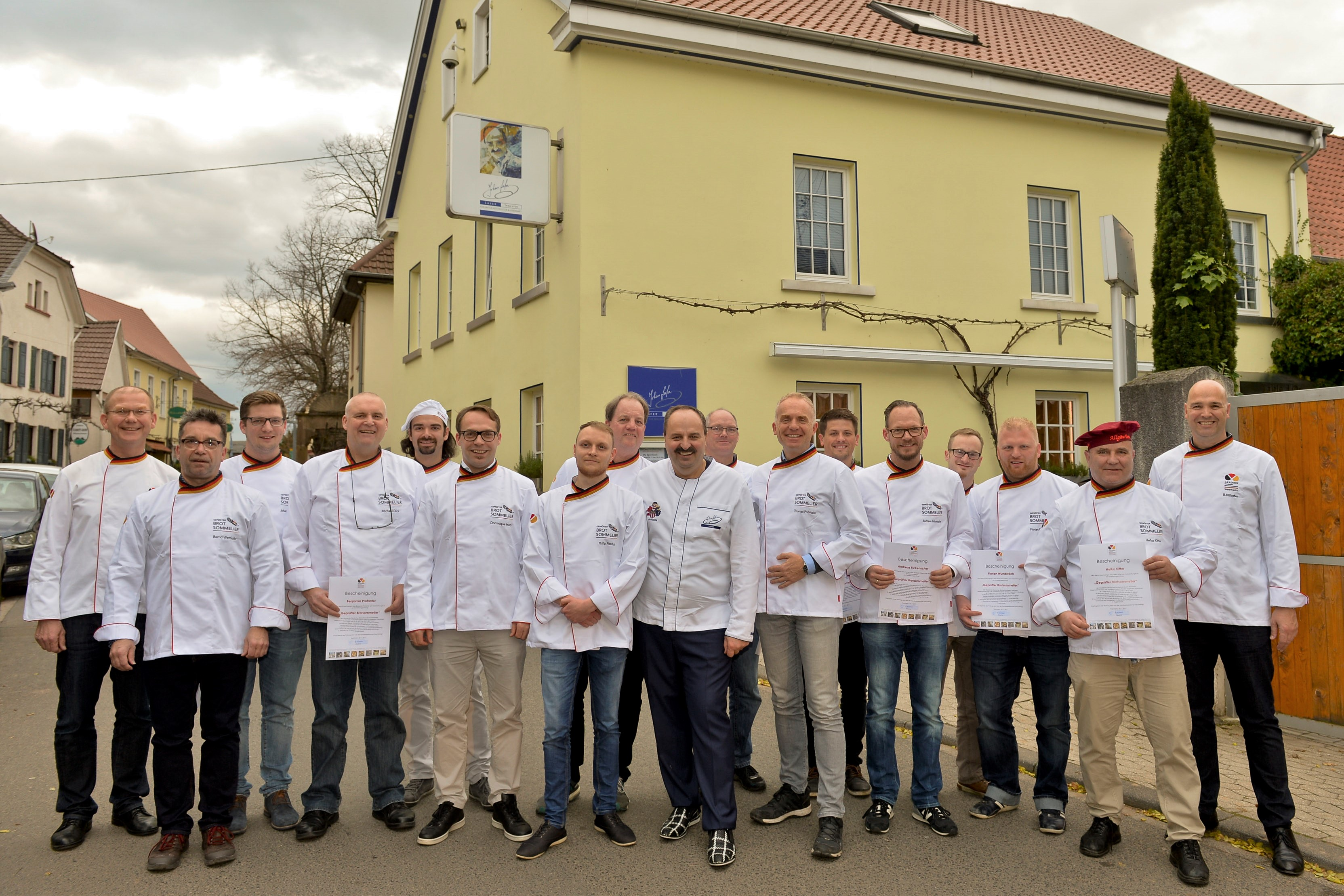 Brot-Sommeliers 2017 mit Johann Lafer (Foto Markus Hildebrand)